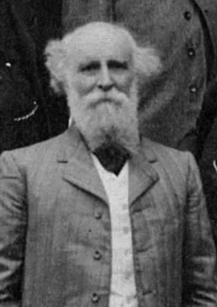 Extrait d'une photographie représentant Diogène Maillart et les Amis des Arts à, Beauvais vers 1910